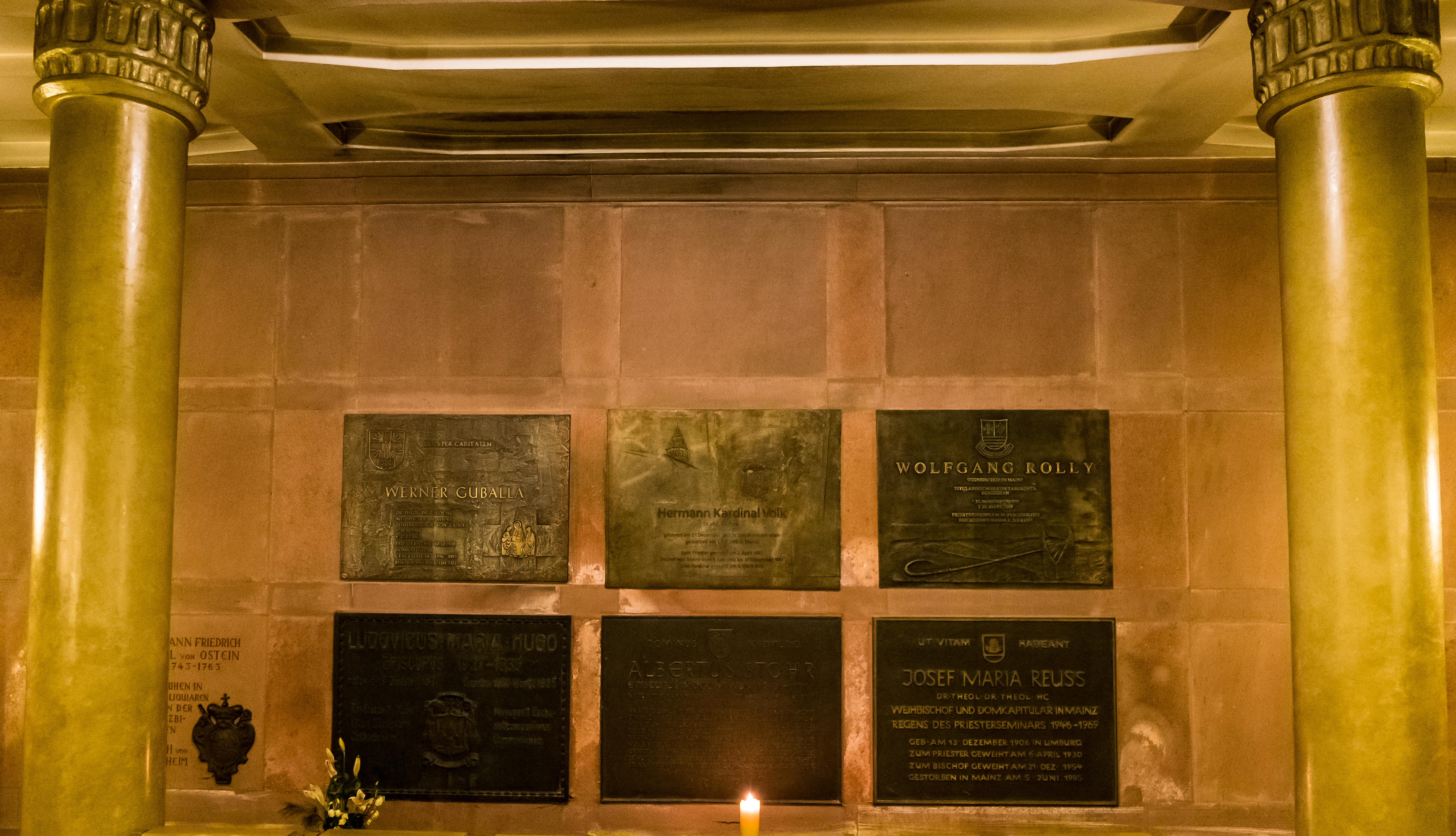 Rückwand der Westkrypta des Mainzer Doms, Grabplatten der Bischöfe Ludwig Maria Hugo, Albert Stohr, Hermann Volk und der Weihbischöfe Werner Guballa, Wolfgang Rolly und Josef Maria Reuss